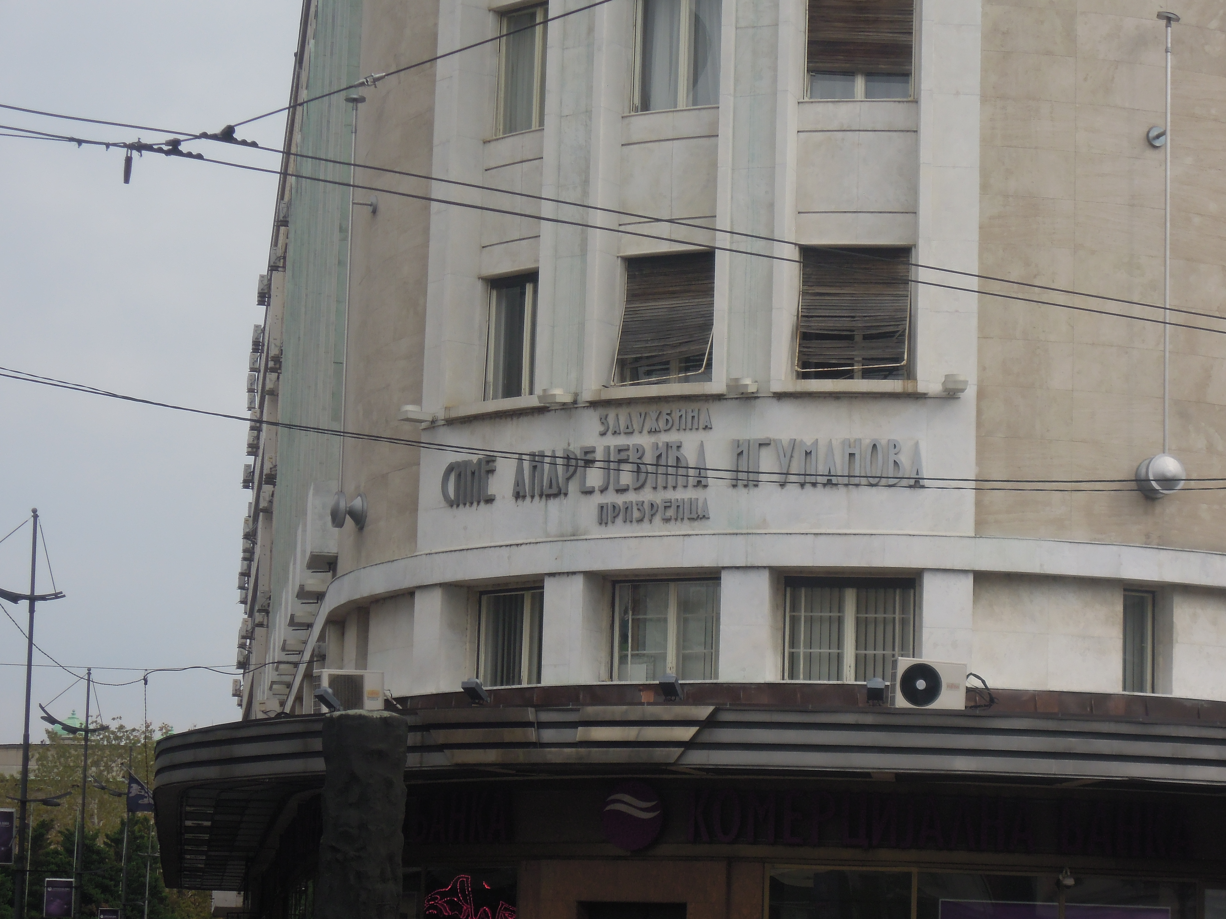 Igumanova palata u Beogradu.